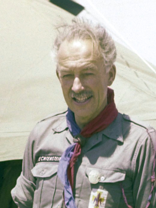 Serie Jamboree en Griekenland; in het midden Prins Emanuel van Liechtenstein